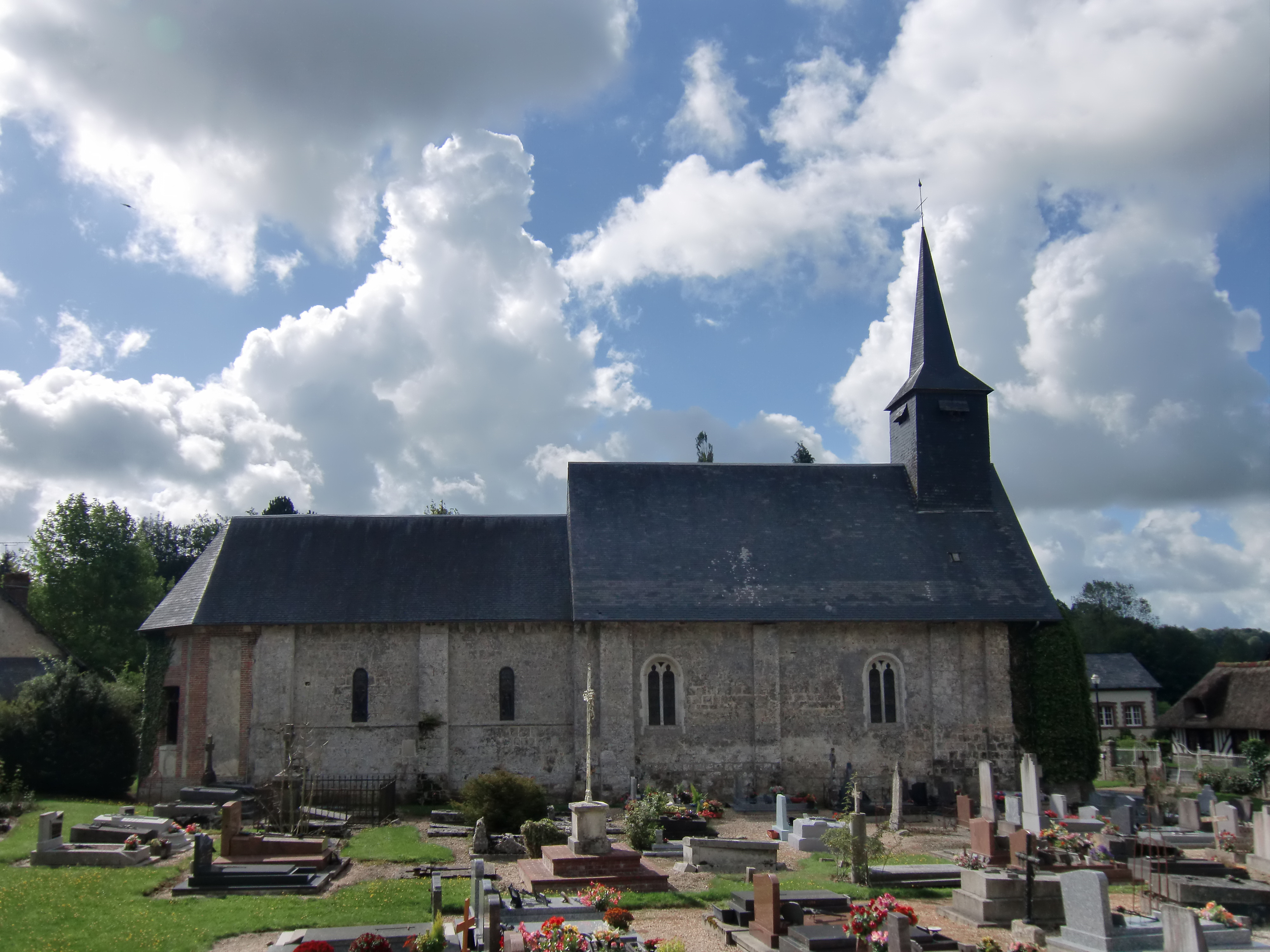 église Notre-Dame-du-Rosaire à Bailleul-la-Vallée (Eure, Normandie, France)